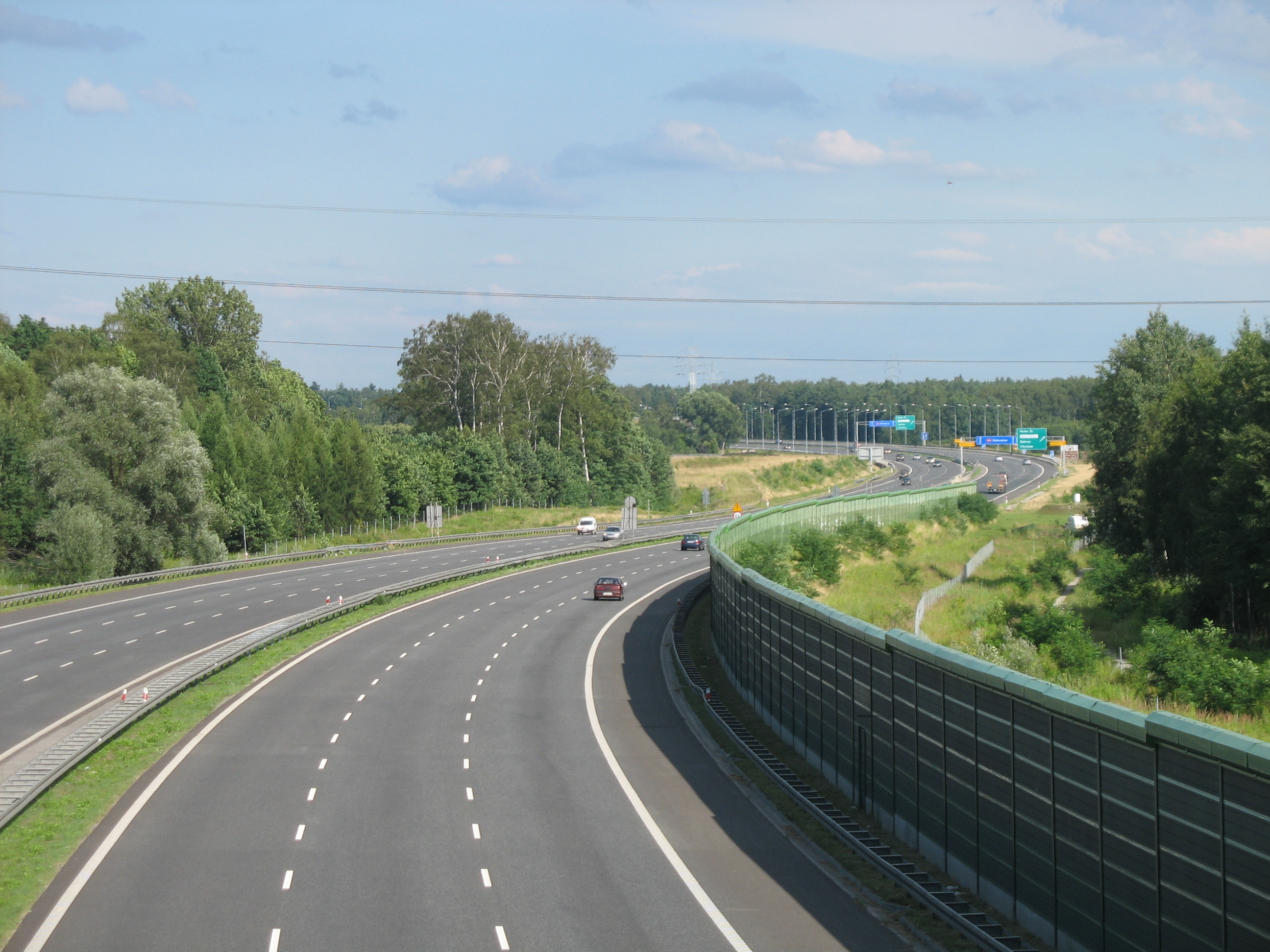 Autostrada A4, Zabrze-Makoszowy